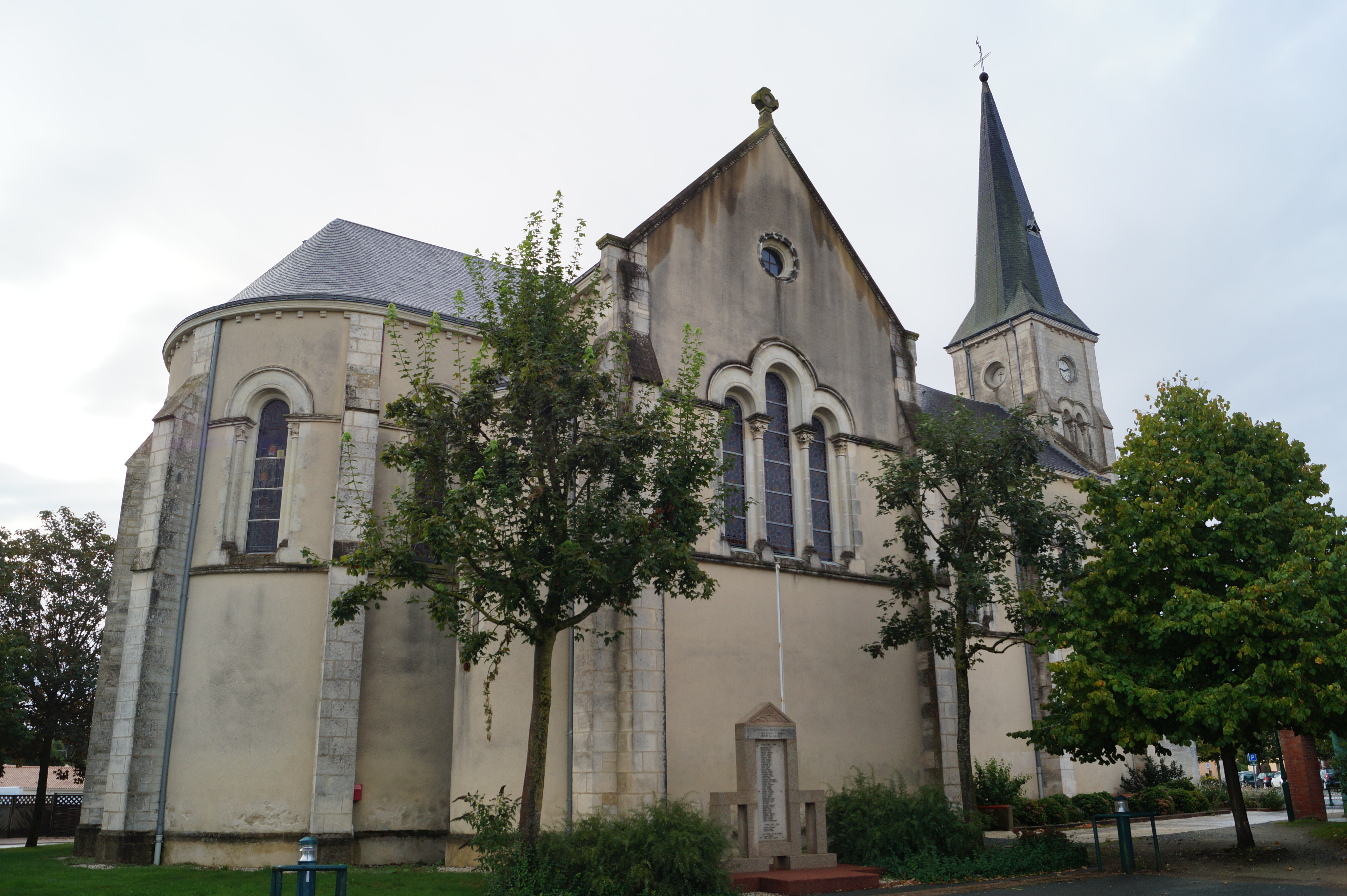 L’église de Sainte-Florence.